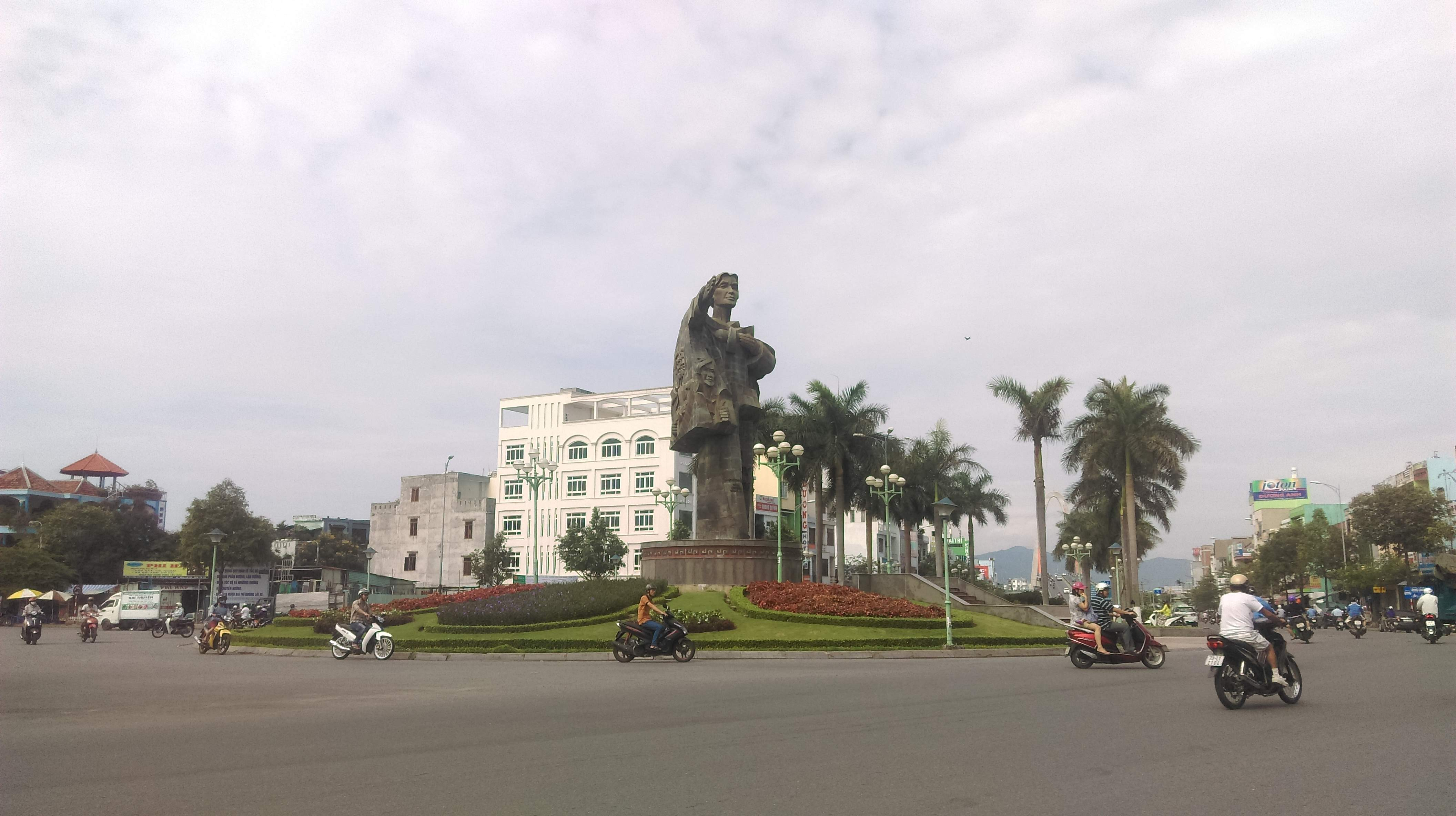 Giấy phép